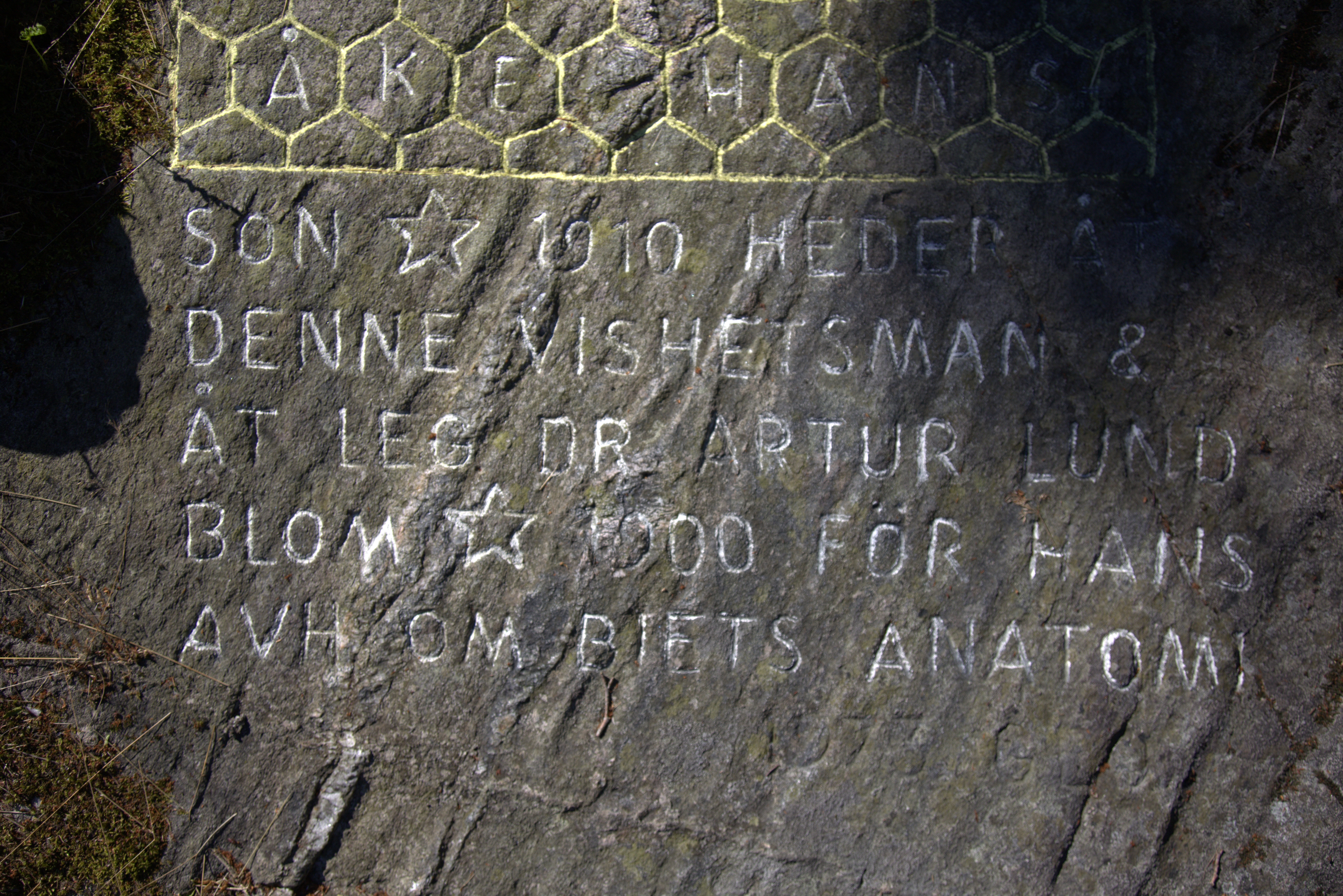 Stenristning av Georg Gustavsson på Lillevatten. Inehåll i honung (text underst). Text: son * 1910 Heder åt denne vishetsman & åt leg. dr. Arthur Lund- blom *1900 för hans avh om biets anatomi 1973 Geo